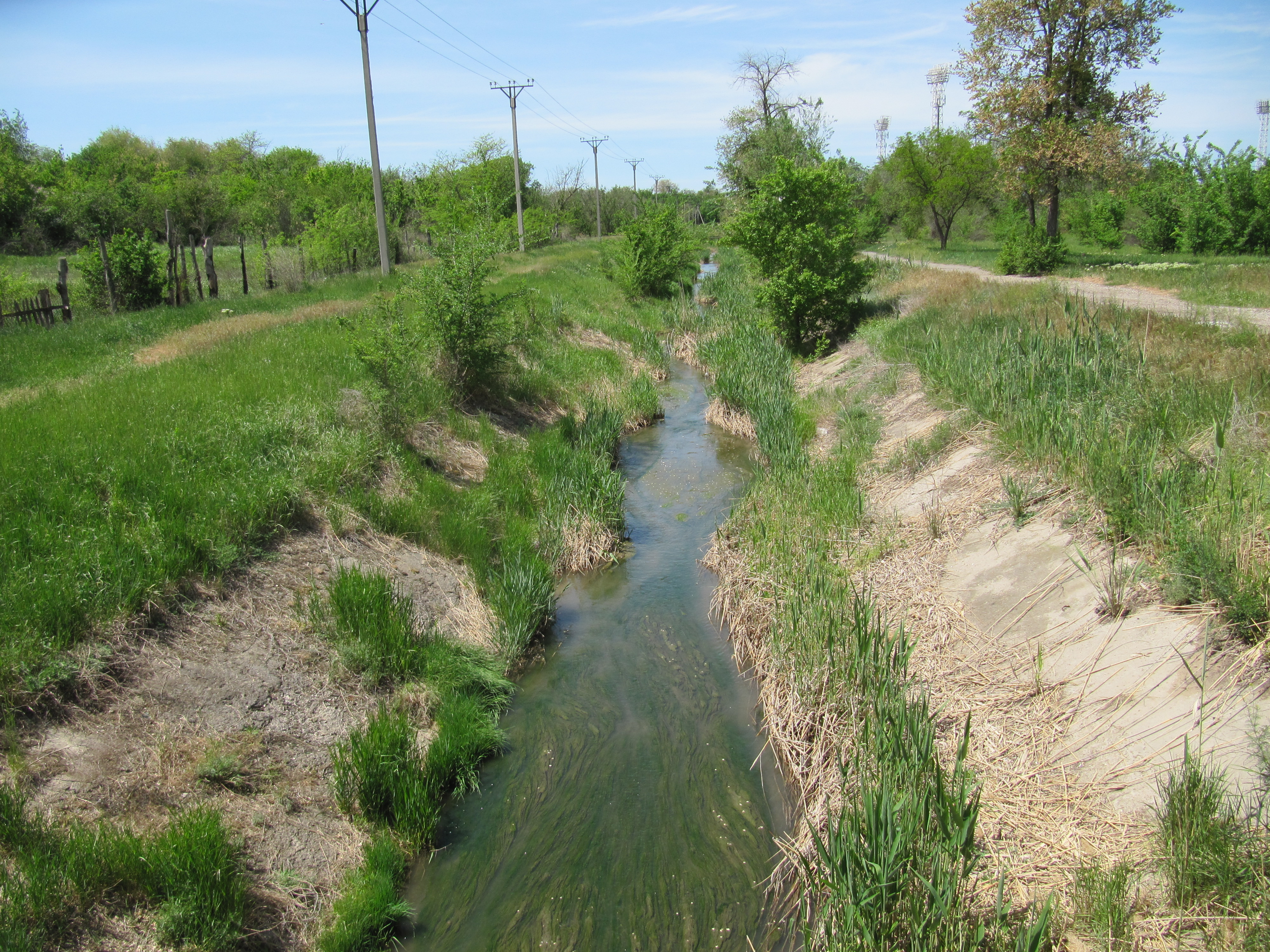 Река Элистинка